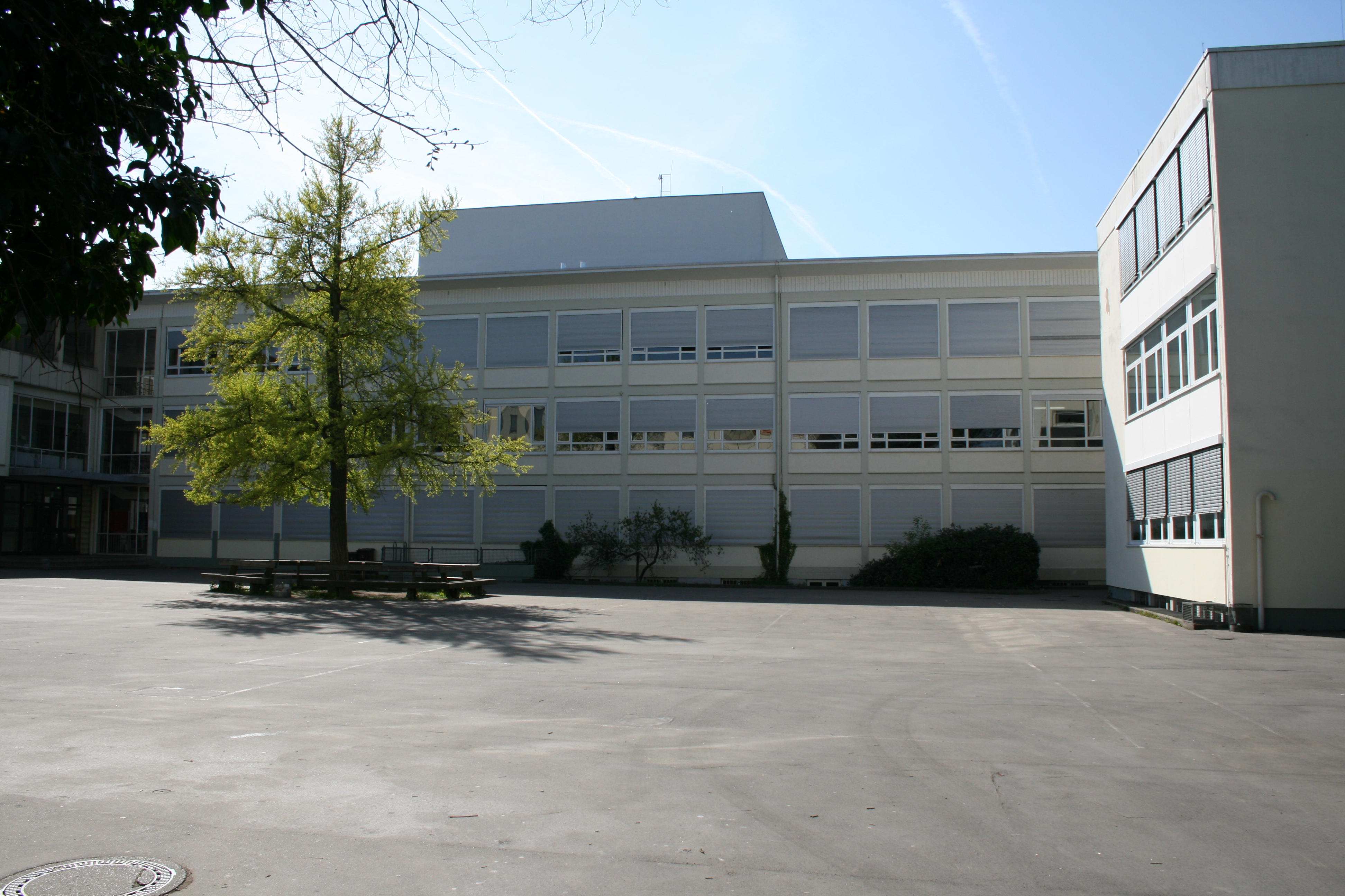 Schulhof der Karl-Rehbein-Schule nach dem Unterricht.